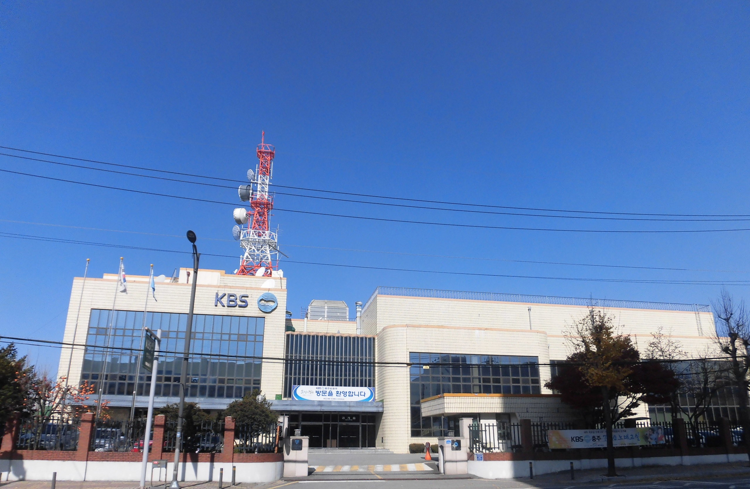 충청북도 충주시에 있는 KBS충주방송국